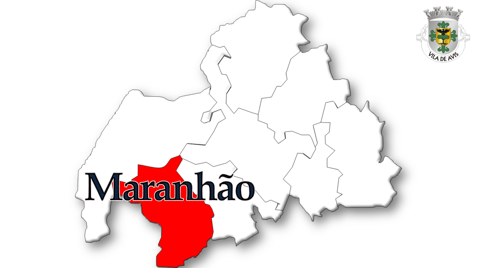 Evolução da População